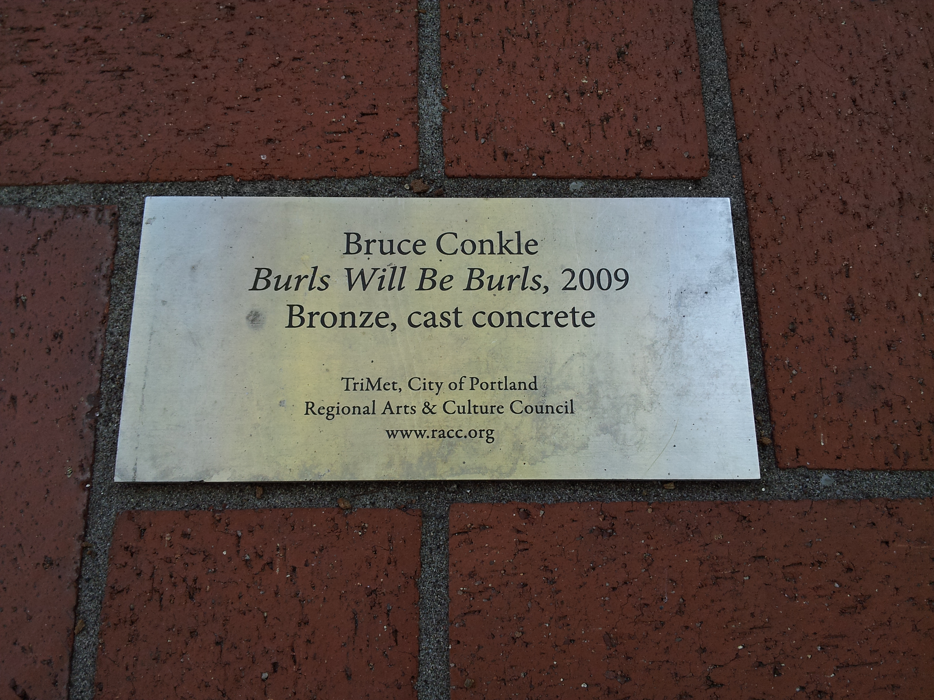 Bruce Conkle, Burls Will Be Burls, Portland